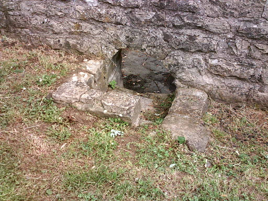 Blick durch den Lichtschacht in den Keller der villa rustica bei Bad Rappenau-Zimmerhof